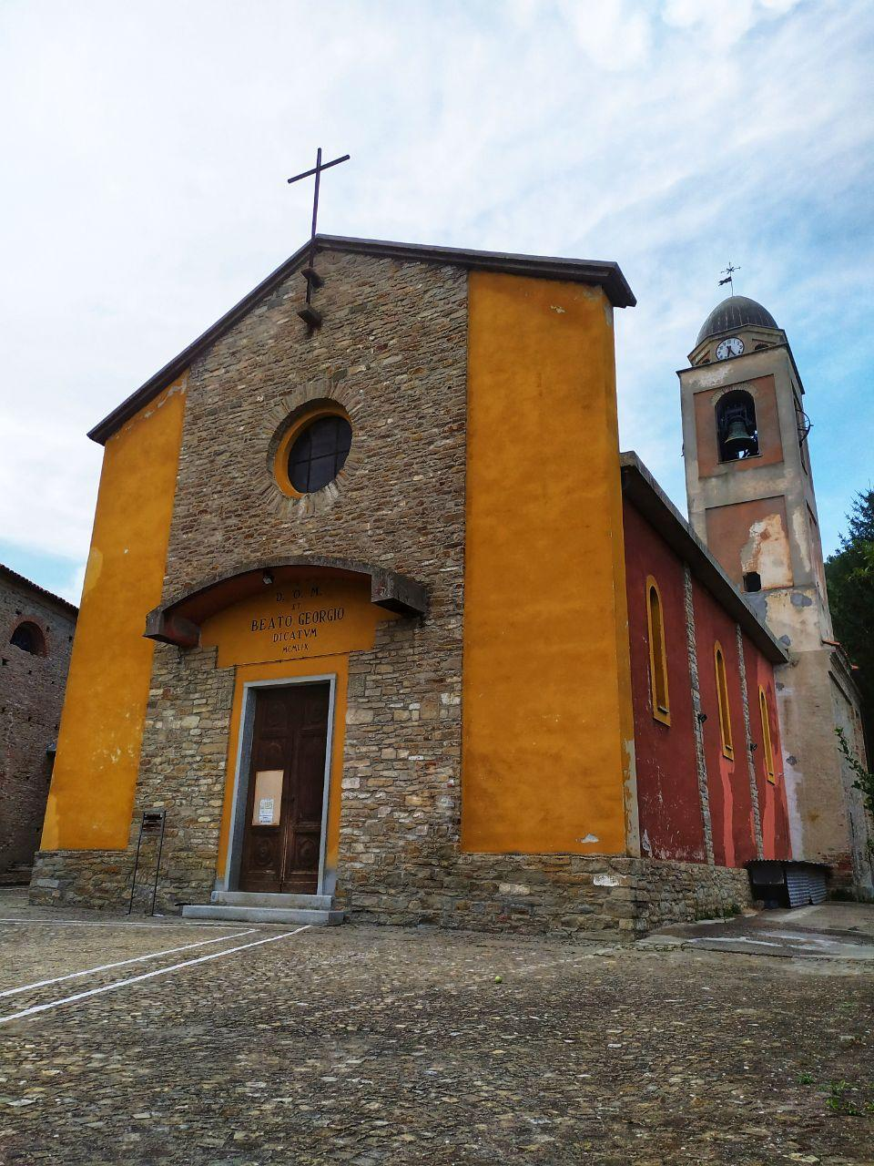 Luogo di culto, edificio religioso.